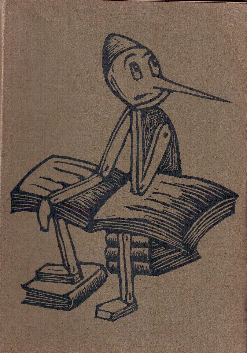 Volume edito dalla Libreria editrice Paci "la Tifernate" - G. Paci editore di Città di Castello (PG), Italia.